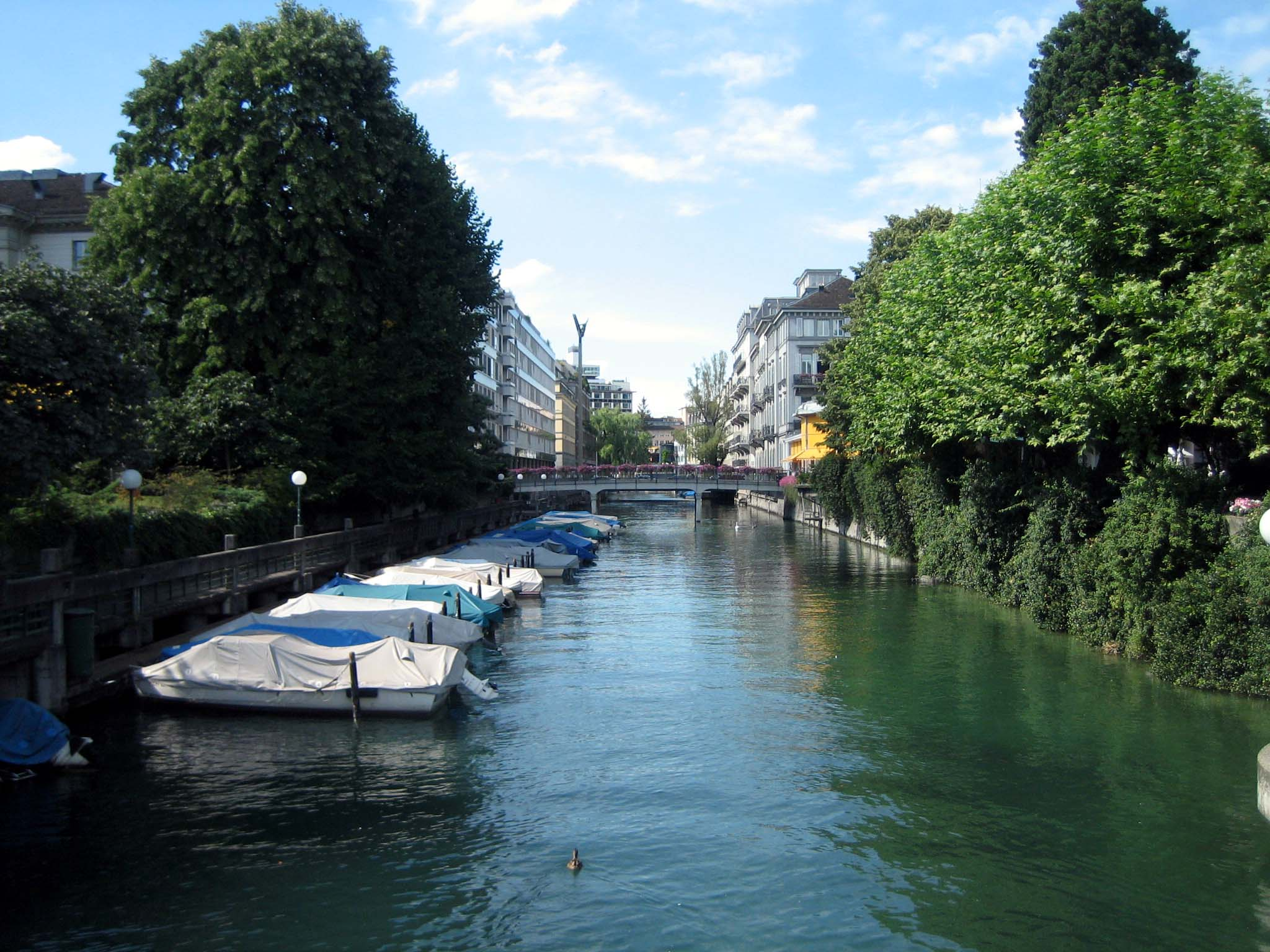 Schanzengraben